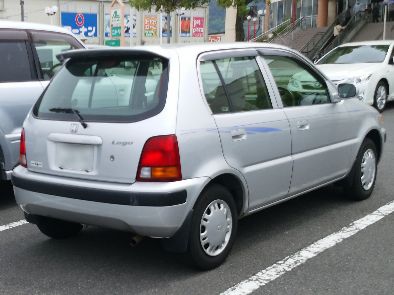 ロゴ 5ドア（前期型）